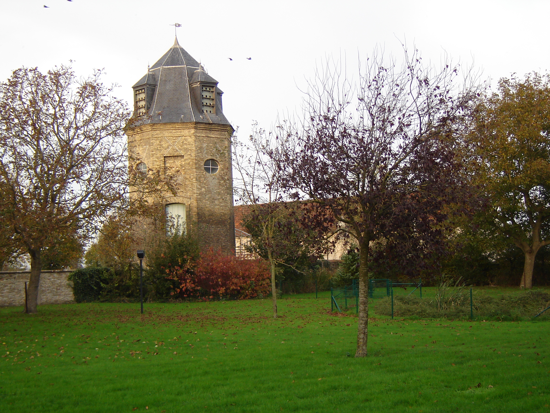 Duiventoren in Lo, Lo-Reninge, West-Vlaanderen. Duiventoren (pigeon tower) in Lo, Lo-Reninge, West-Flanders, Belgium